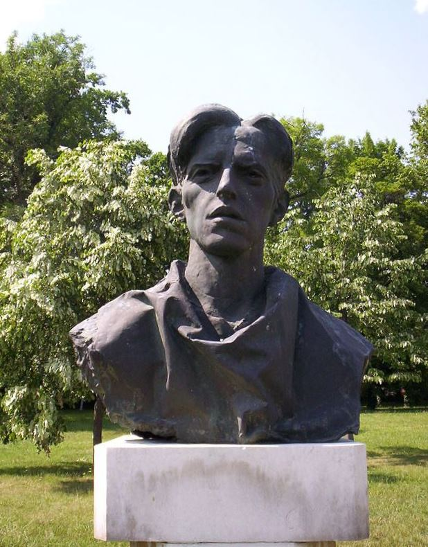 György Kilián, Hungarian communist activist. László Marton's statue in Köztársaság Liget, Pápa, Hungary. Kilián György, kommunista aktivista. Marton László szobra a pápai Köztársaság Ligetben.